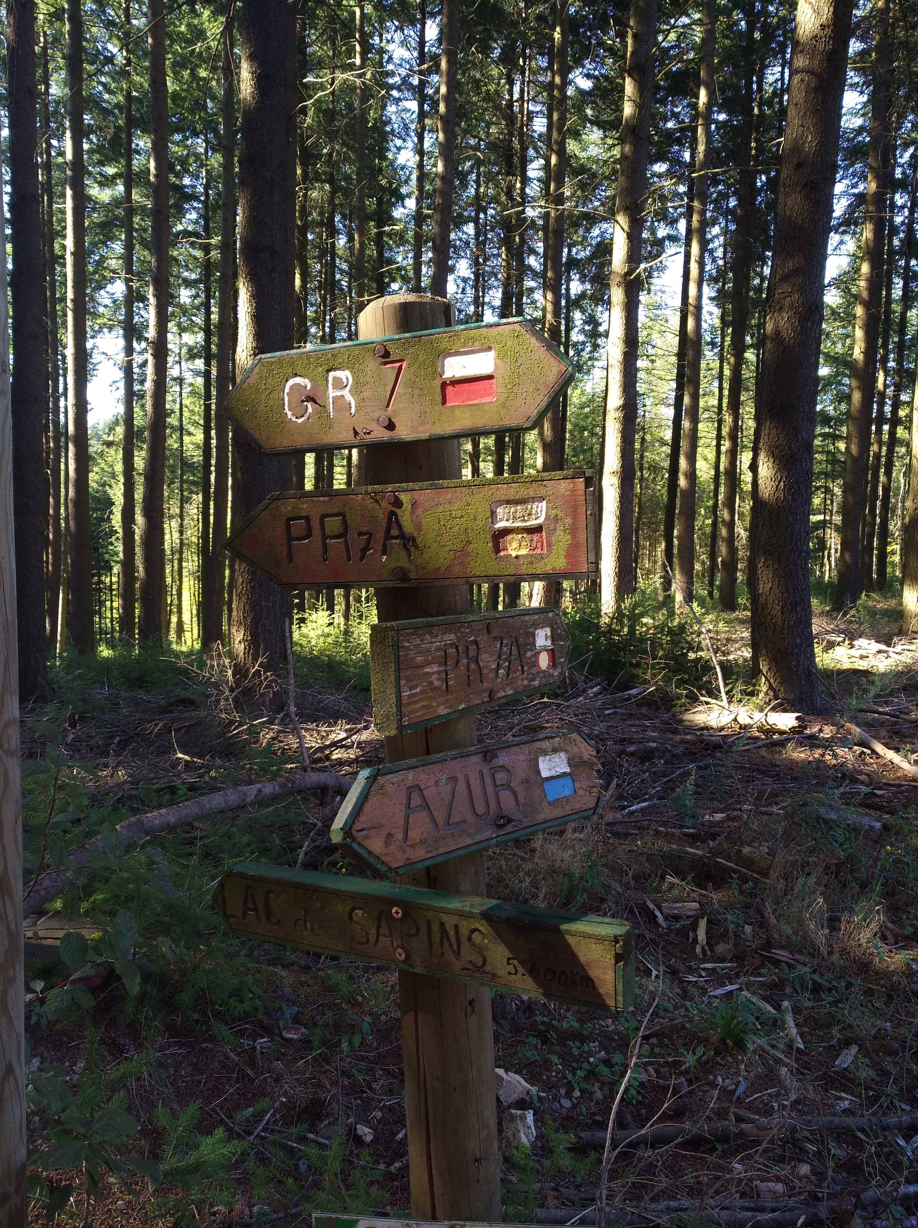 Panneaux en bois indiquant plusieurs itinéraires de randonnées, dont le GR7, au seuil des Mollières, sur la commune de Cublize (Rhône, France).